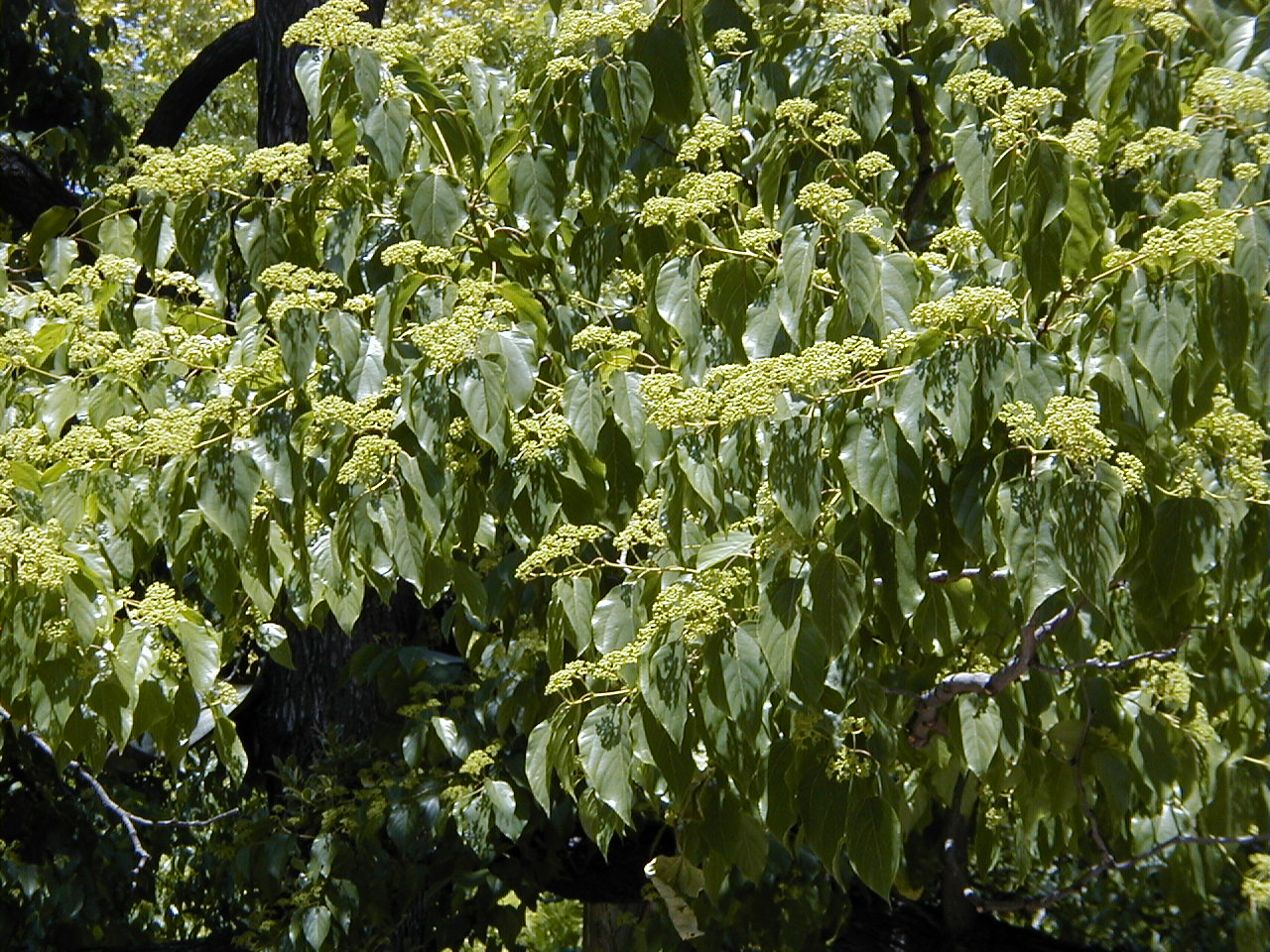 Hovenia dulcis. Real Jardín Botánico, Madrid.